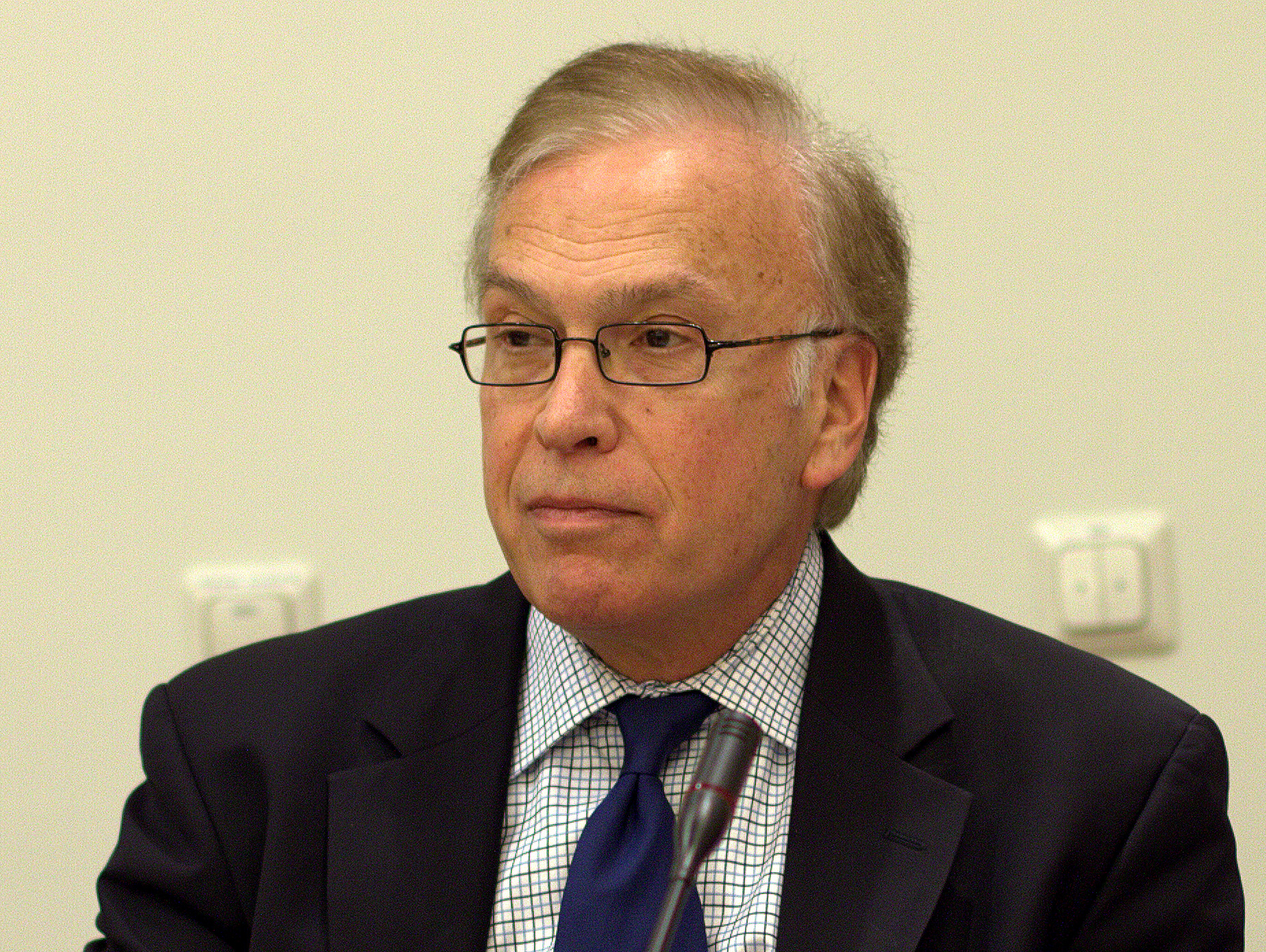 Lester M. Salamon in Estonia in 2011